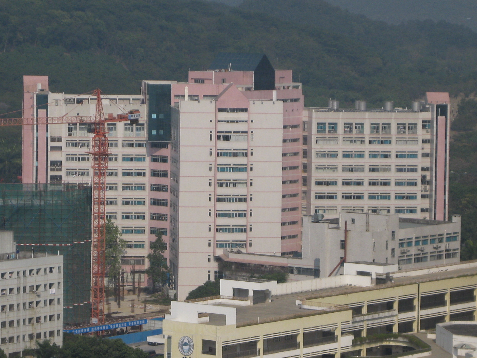 深圳市儿童医院